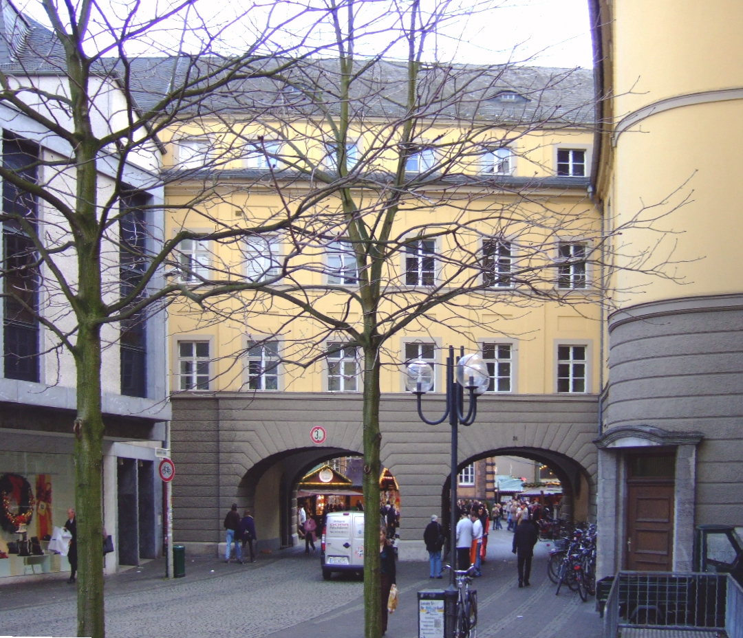 Altes Stadthaus, Bonn: Durchgang Windeckstraße–Bottlerplatz